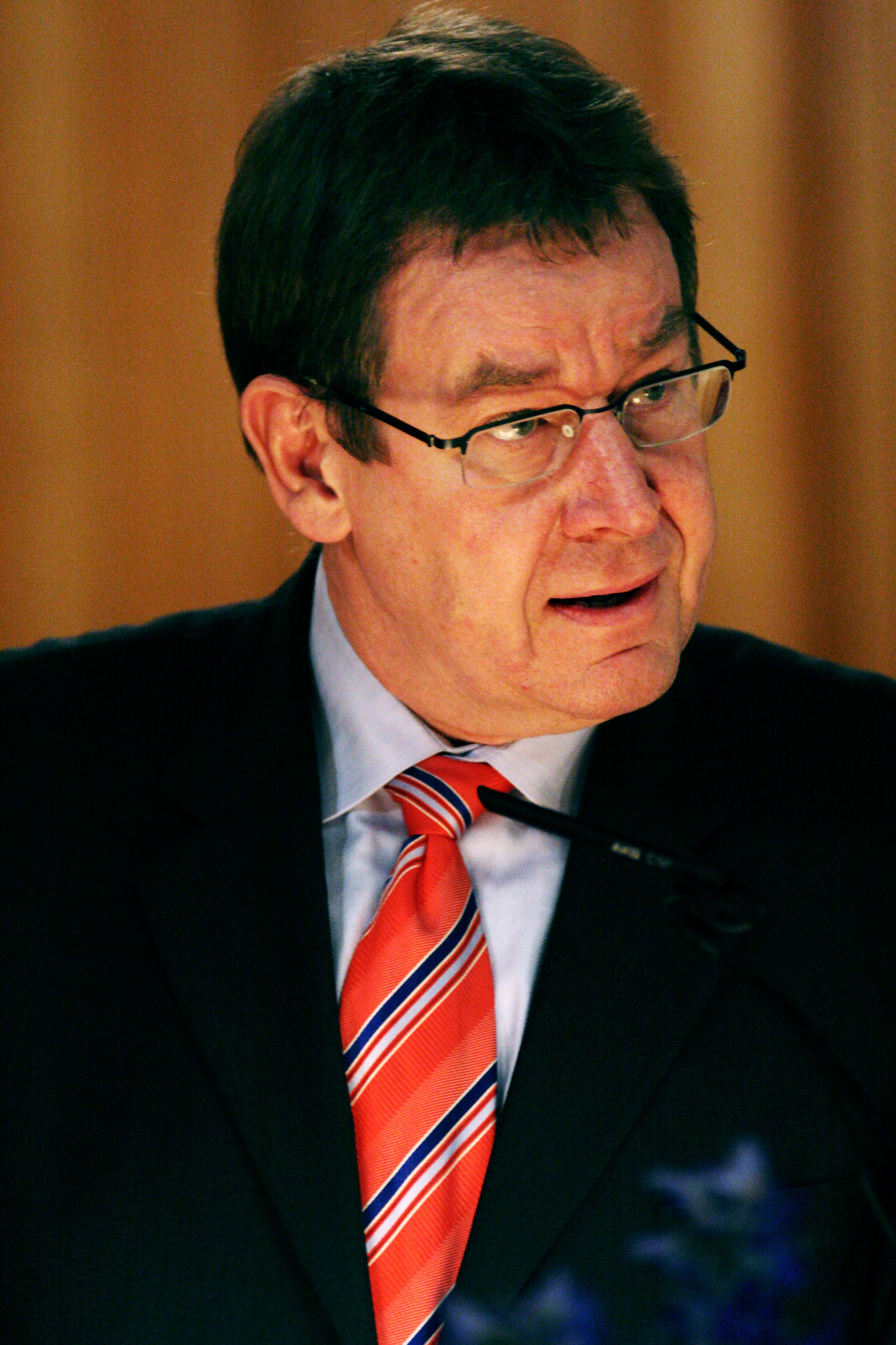 Poul Nyrup Rasmussen, Danmarks tidigare statsminister, numera EU-parlamentariker.